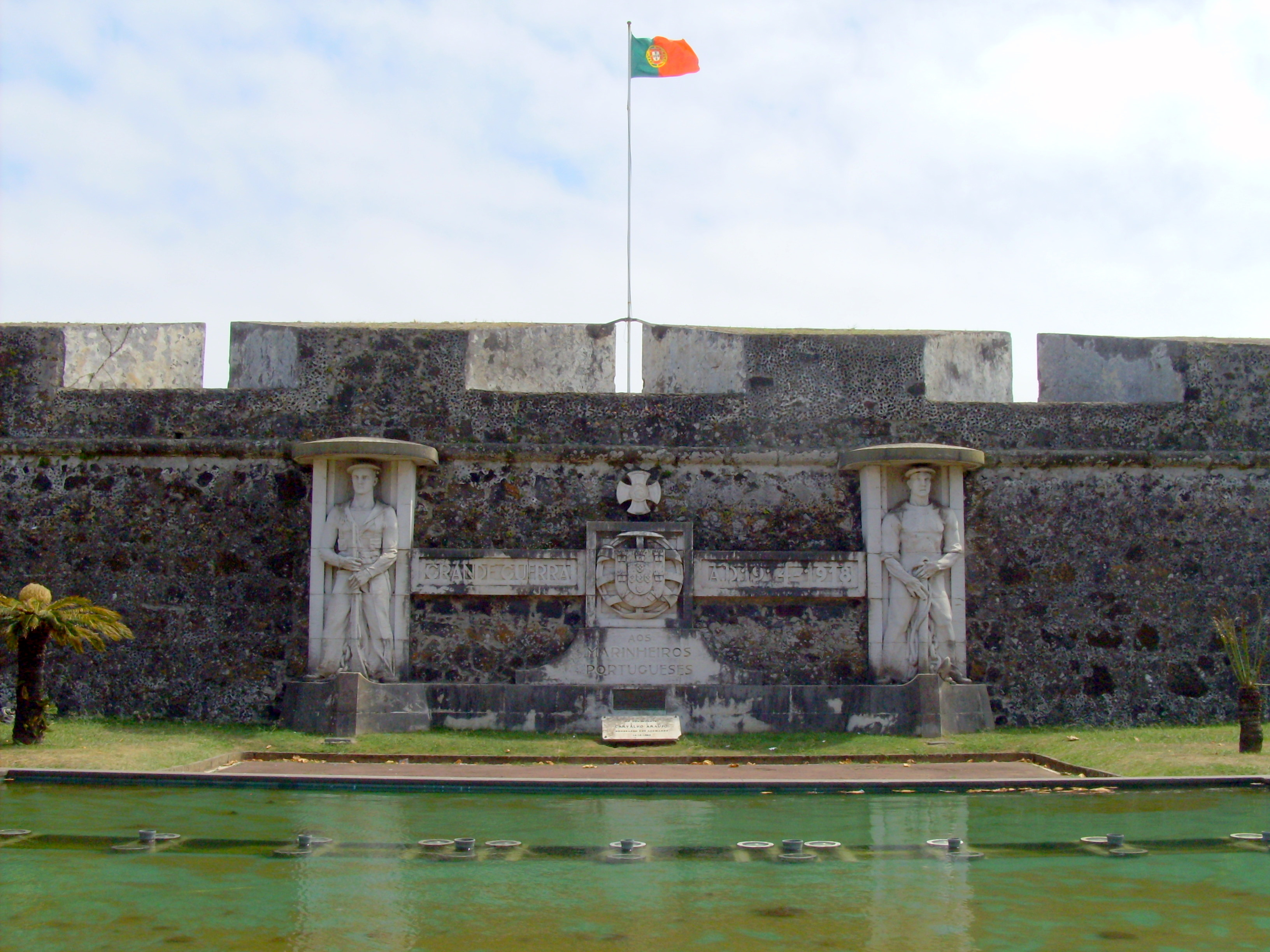 Forte de São Brás, Ponta Delgada, Ilha de São Miguel, Açores: Monumento aos Mortos da Primeira Guerra Mundial.